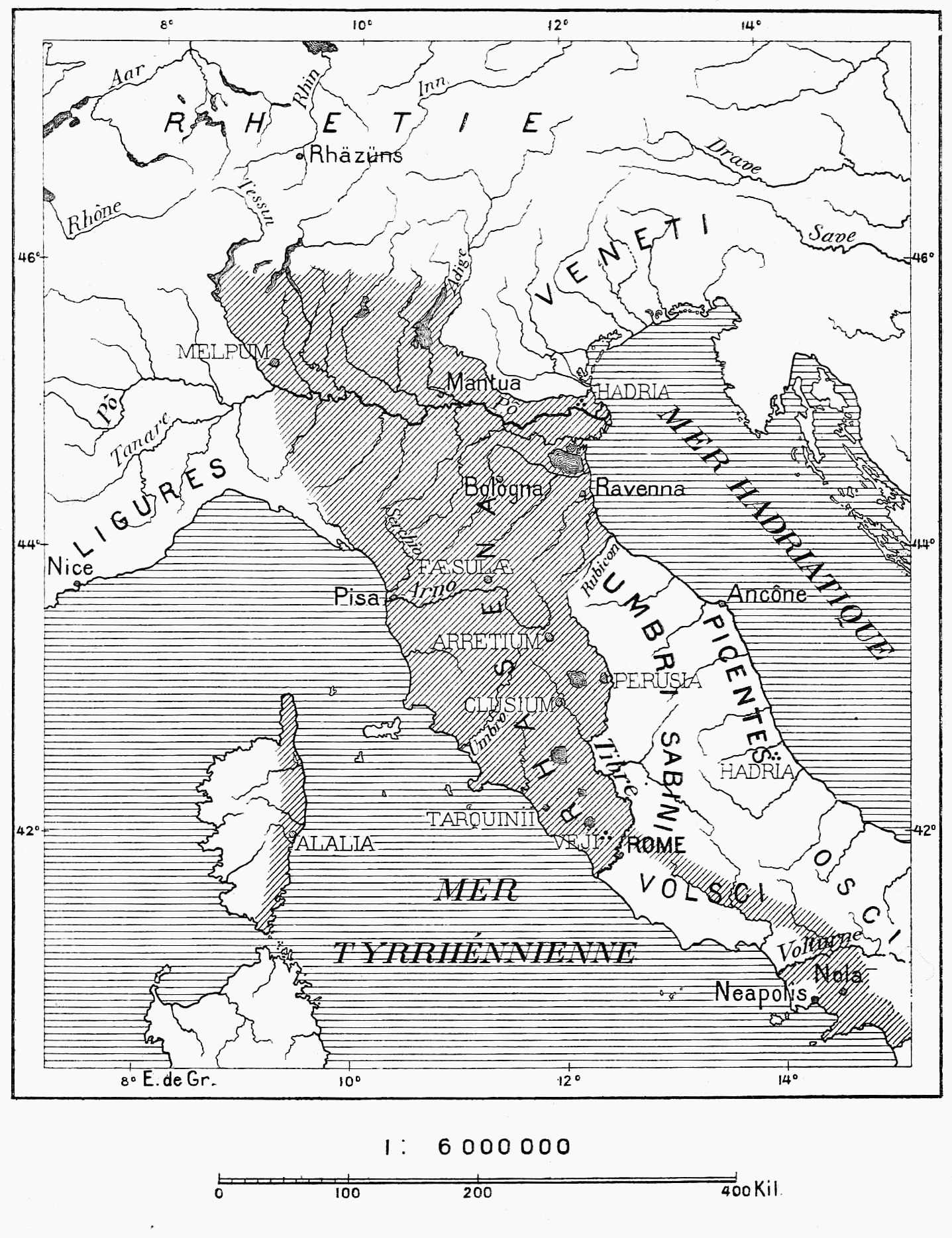 Aire du territoire étrusque